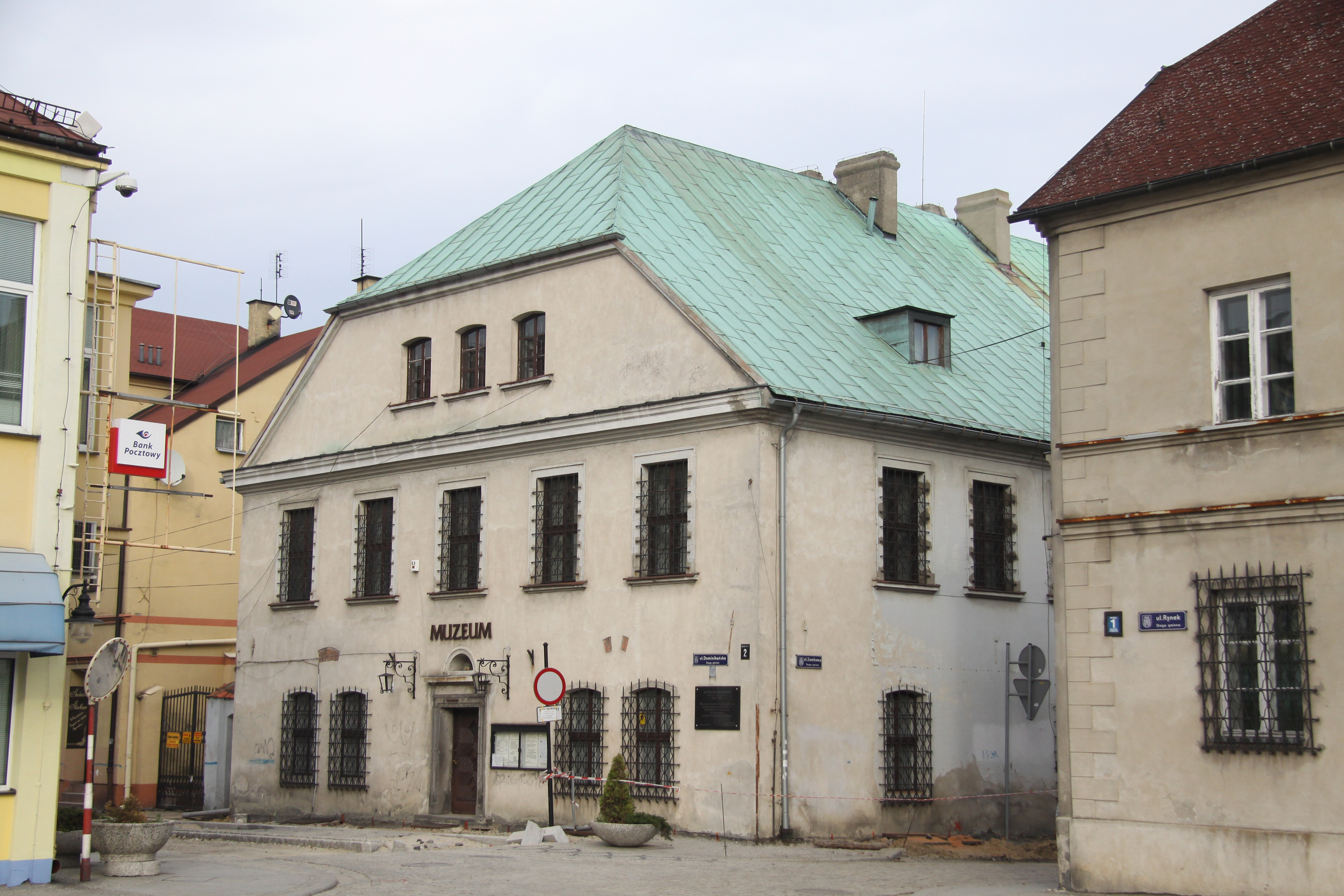 Sieradz, ul. Dominikańska 2 - kamienica, mur., XVII, XIX/XX w., obecnie Muzeum Okręgowe (zabytek nr 57/293 z 28.12.1967)